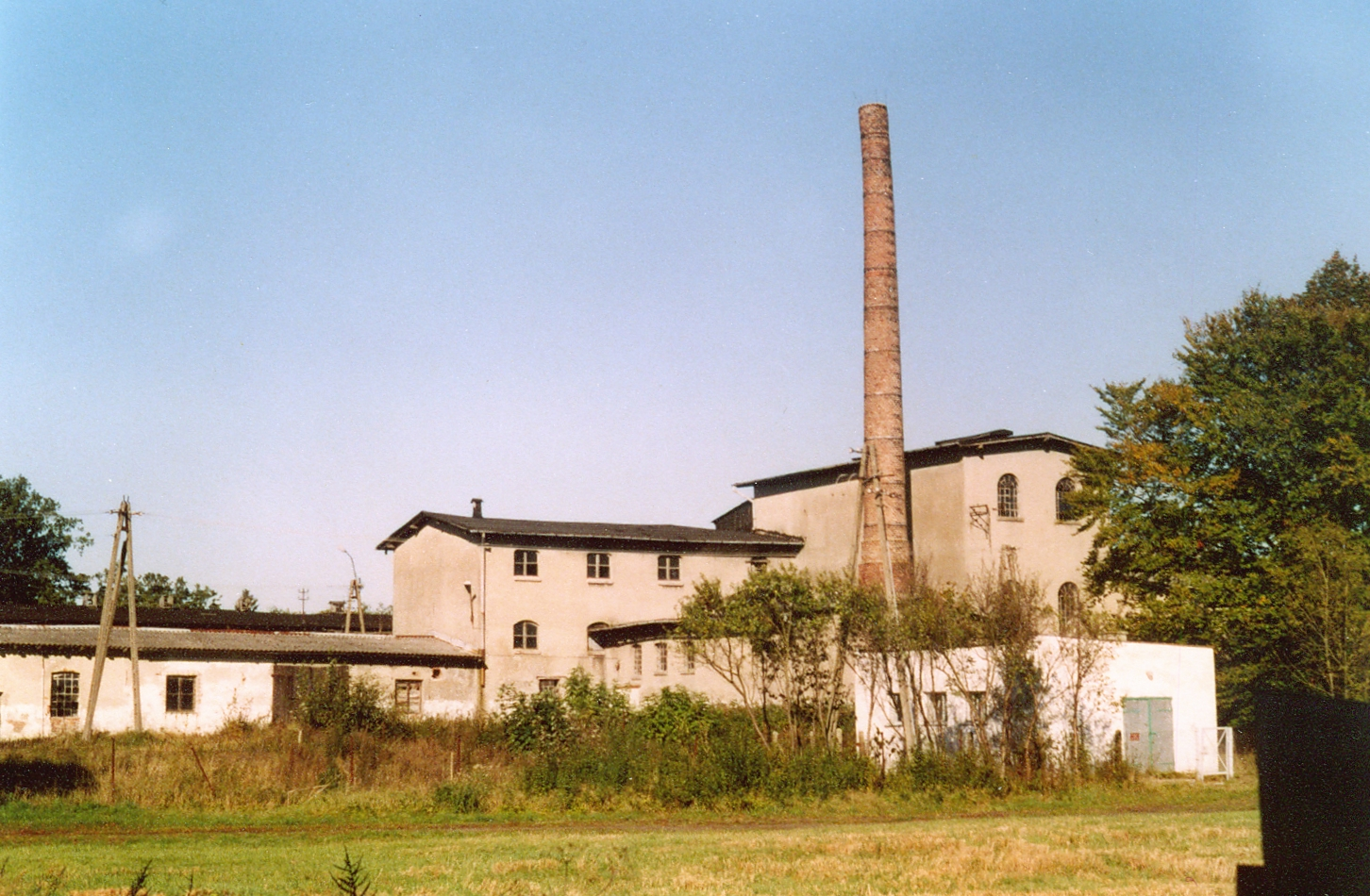 Rumsko